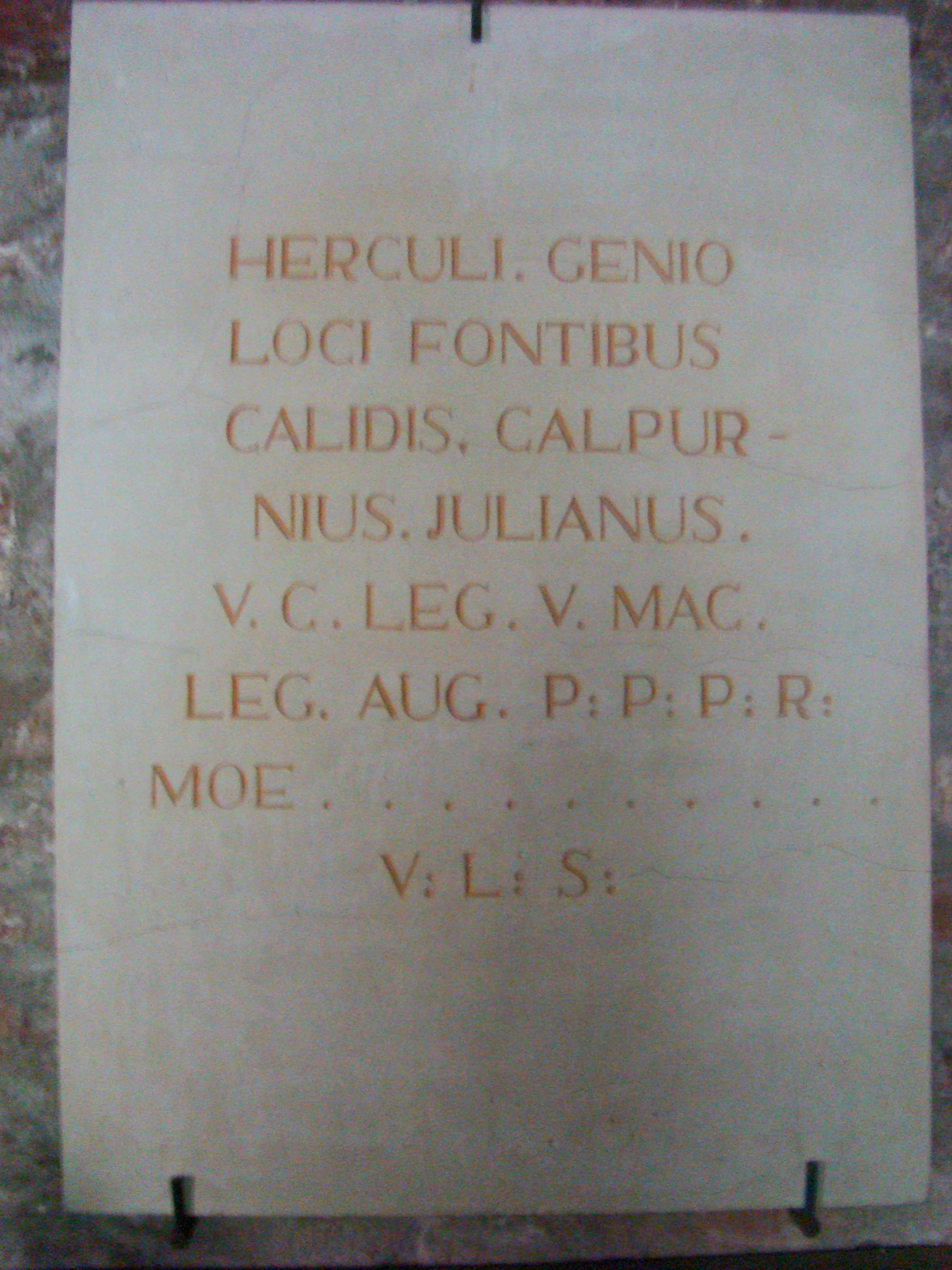 Baia romană, cu basorelieful lui Hercule, oraș Băile Herculane, Str. Romană 1 la demisolul și subsolul Hotelului „Roman”